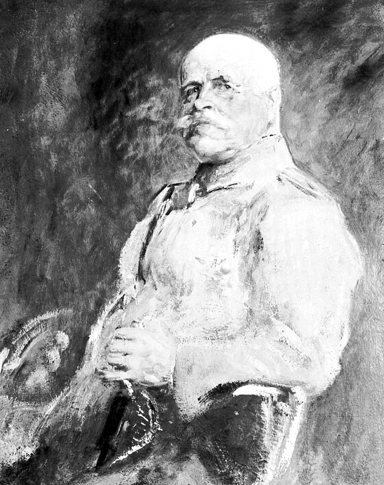 Bildnis des Generalfeldmarschalls Hermann von Eichhorn (1848-1918), 1916, Bild, Frankfurt (Main), Städelsches Kunstinstitut und Städtische Galerie, SG 346